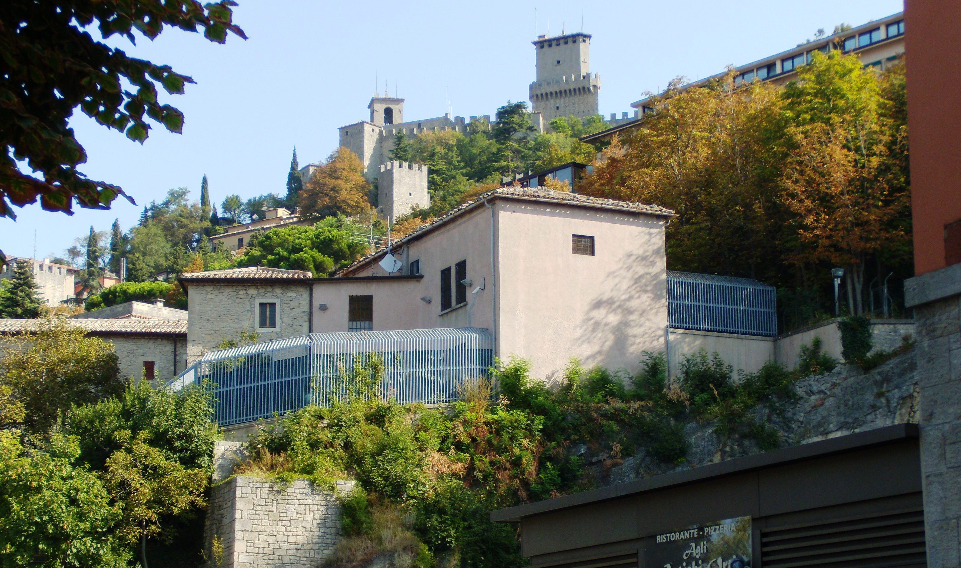 Il Carcere di San Marino visto da viale Federico di Urbino.